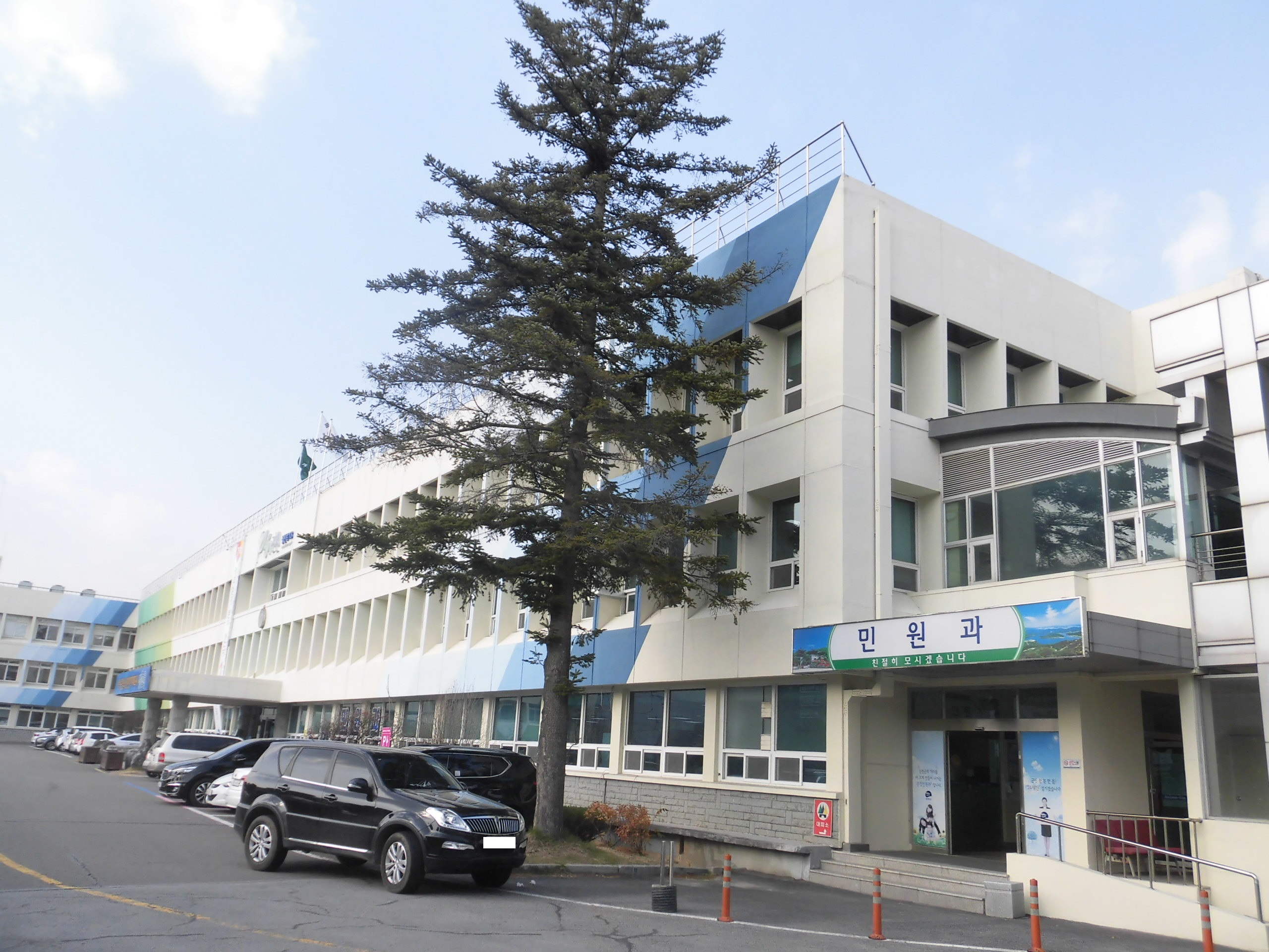 충청북도 진천군에 있는 진천군청